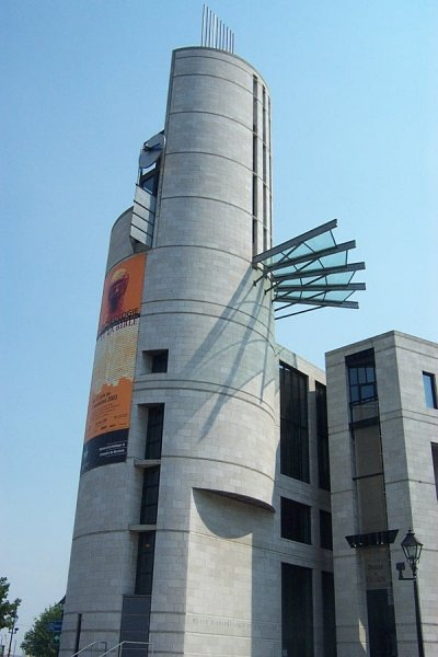 Pointe-à-Callière museum, Montreal